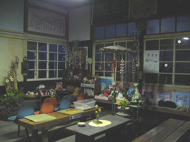 久大本線筑後大石駅 美しく飾られた駅舎内 2006年3月 Bakkai撮影